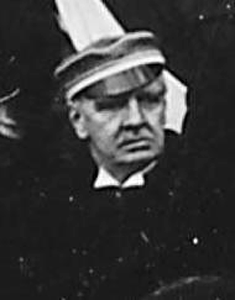 Канстанты Курнатоўскі (1878—1966) — пастар евангелічна-рэфармацкай царквы, віцэ-прэзідэнт Кансісторыі Рэфармацкай царквы ў Літве. Прафесар тэалогіі Універсітэта Вітаўта Вялікага ў Коўне. У 1938 годзе стаў генеральным суперінтэндантам у Вільні. У 1939 годзе, ратуючыся ад бальшавікоў, эміграваў на Захад.